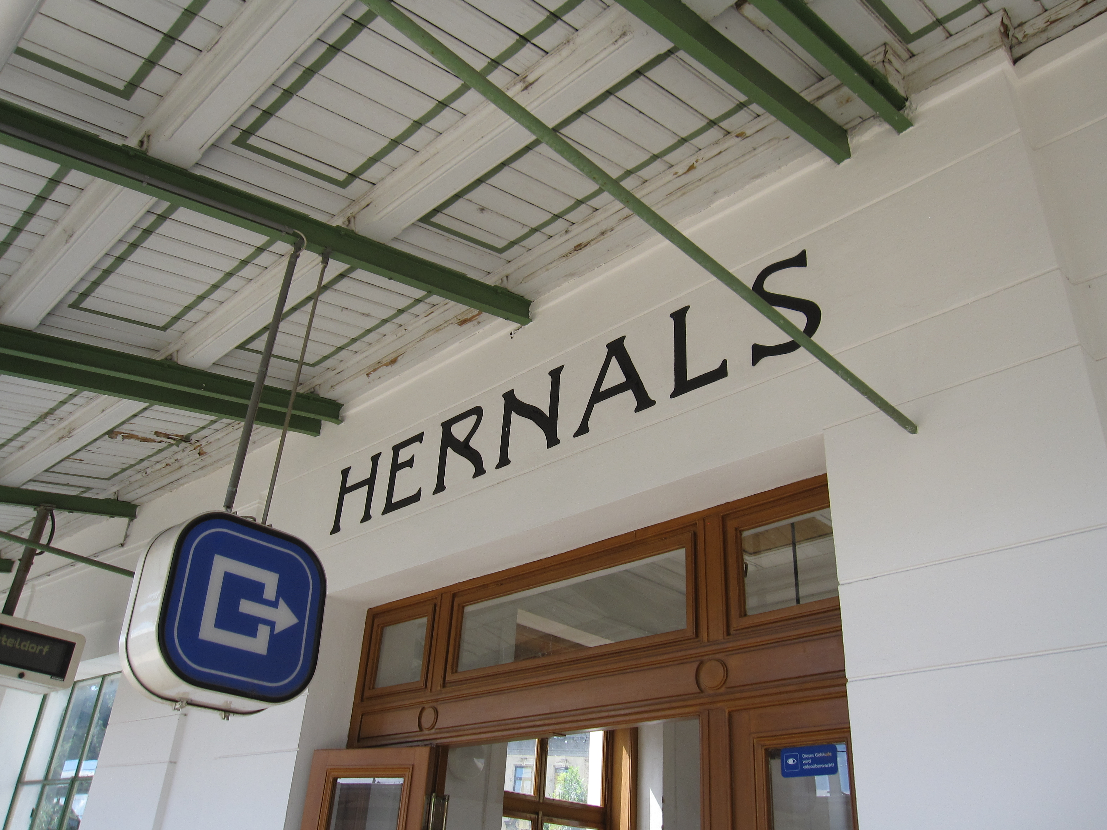 Bahnhof Wien Hernals